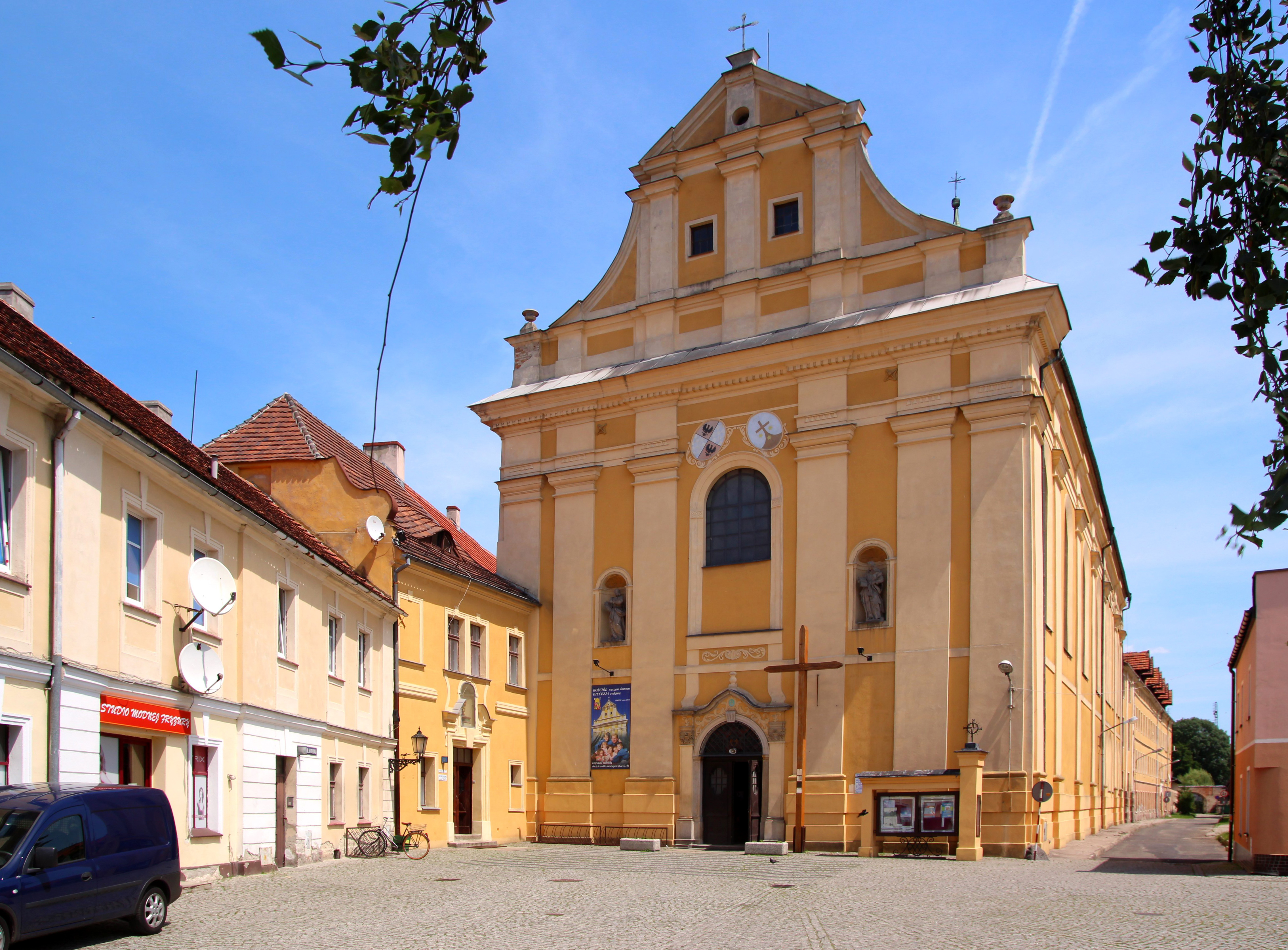 Wołów - barokowy kosciół parafialny pw. św. Karola Boromeusza, 1712-1726, 1781